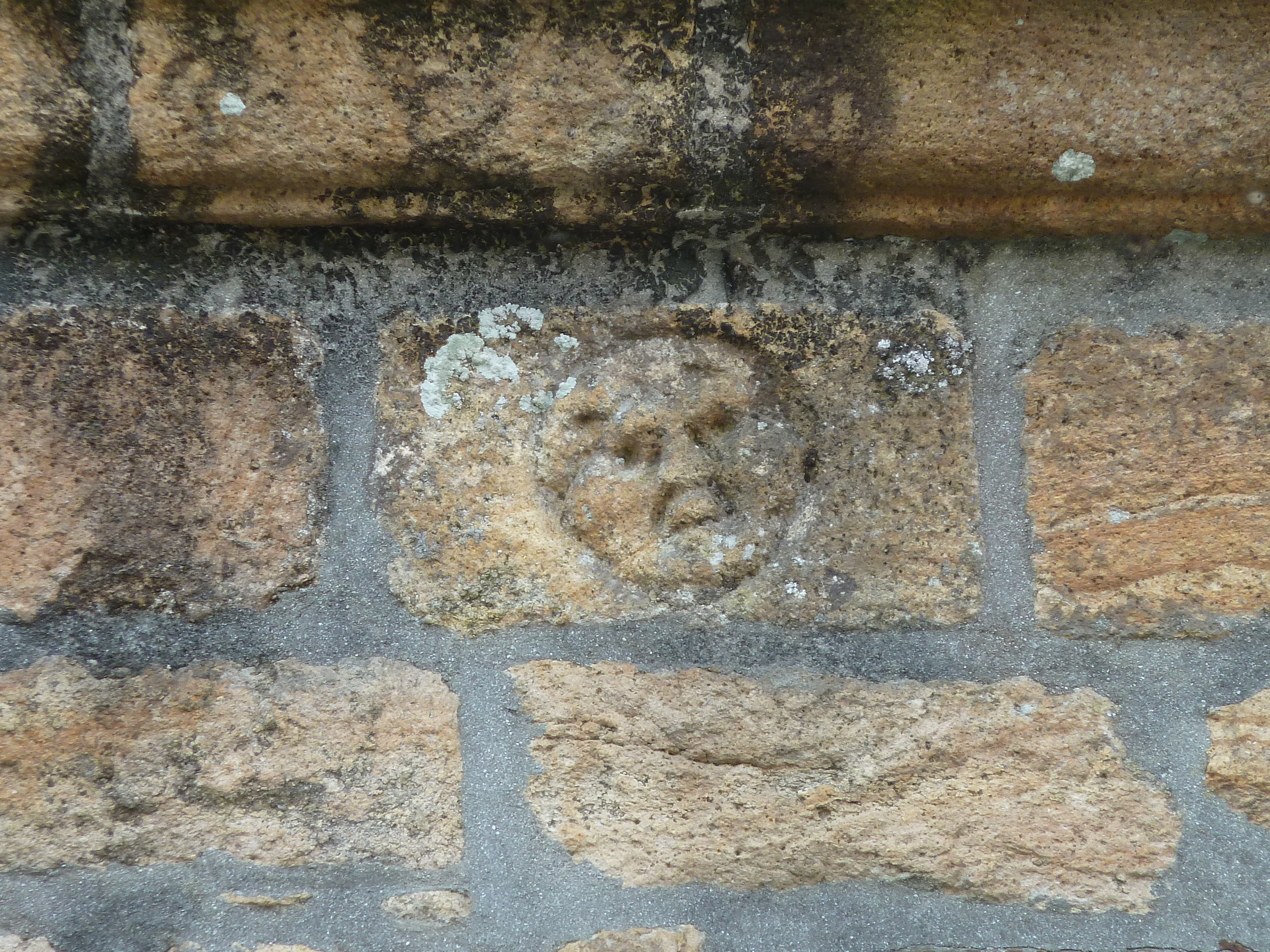 Détail de la maison des 13 lunes, Landerneau